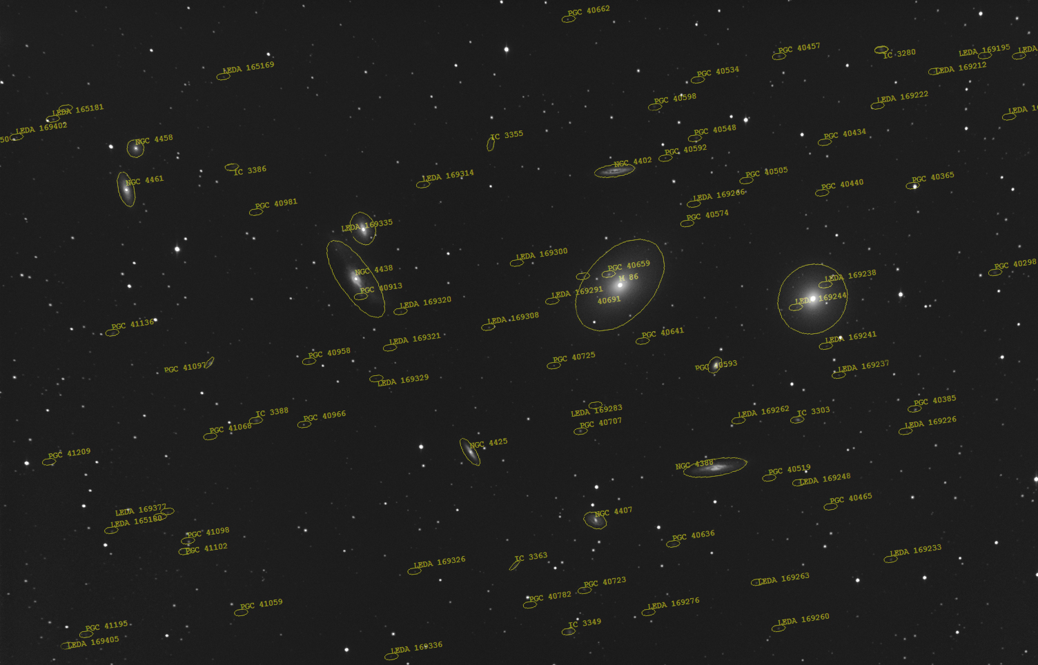 Ammasso di galassie della Vergine con l'indicazione delle galassie visibili. Immagine ripresa presso l'osservatorio Serafino Zani, durante una prova in campo per i componenti del gruppo iscritti al corso di fotografia astronomica del 2012 Somma di 59 immagini da un minuto di posa ciascuna. Elaborazione con stretching logaritmico e rinforzo di A. Soffiantini